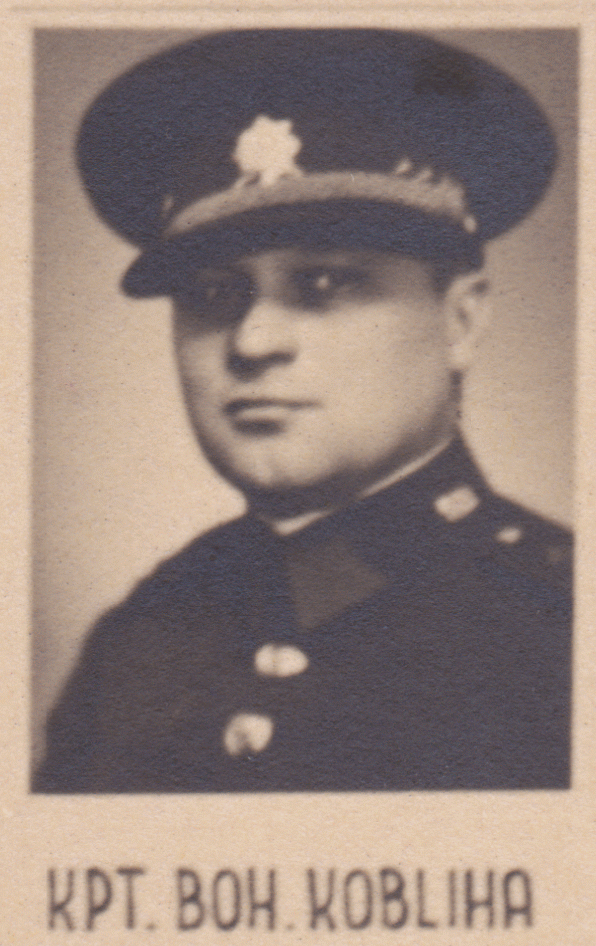 Generál Bohumír Kobliha na tablu Vysoké školy válečné v Praze v hodnosti kapitána. Toto školu navštěvoval v letech 1931 až 1934 a v roce 1934 ji absolvoval v výborným prospěchem. Bohumír Kobliha (* 1902 - 1981) byl důstojníkem prvorepublikové československé armády a topografem. Po vypuknutí druhé světové války se jako vševojskový velitel v bojových jednotkách účastnil západního zahraničního odboje. Do vlasti se vrátil po válce jako důstojník s frontovými zkušenostmi. V hodnosti plukovníka generálního štábu se Bohumír Kobliha stal prvním poválečným velitelem Vojenského zeměpisného ústavu (VZÚ) v Praze. V Únoru 1948 byl převelen do zálohy a počátkem roku 1949 byl zatčen a obviněn z účasti na zločinech velezrady a vyzvědačství. Ve vykonstruovaném procesu byl odsouzen k deseti měsícům těžkého žaláře. Ten mu byl v roce 1950 prodloužen na tři roky vězení, které prožil prací v uranových dolech. Současně byl potrestán ztrátou vojenské hodnosti a zabavením majetku. Po odpykání trestu pracoval jako pomocný dělník a poté jako úředník (až do odchodu do důchodu v roce 1965) u Pozemních staveb Přerov. V roce 1970 se Bohumír Kobliha pokusil o svoji vojenskou rehabilitaci, která skončila nezdarem. Rehabilitovat se jej podařilo až po jeho smrti (1981) a po Sametové revoluci v roce 1991 na základě žádosti podané jeho manželkou. Bohumír Kobliha byl rehabilitován v plném rozsahu včetně navrácení vojenské hodnosti - plukovník generálního štábu. V roce 1995 byl povýšen (in memoriam) do hodnosti generálmajora.